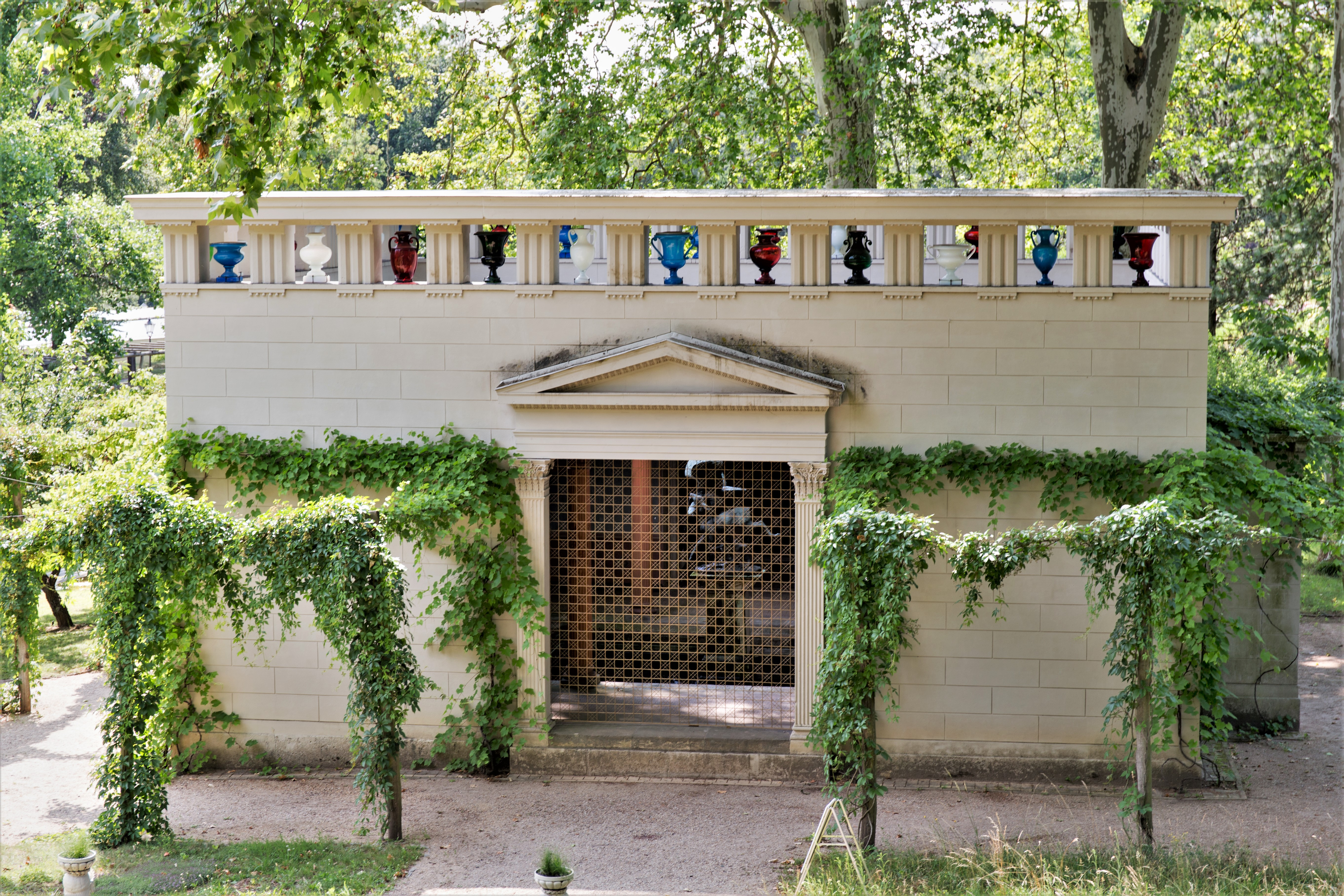 KulTour Parkanlage Sanssouci Stibadium